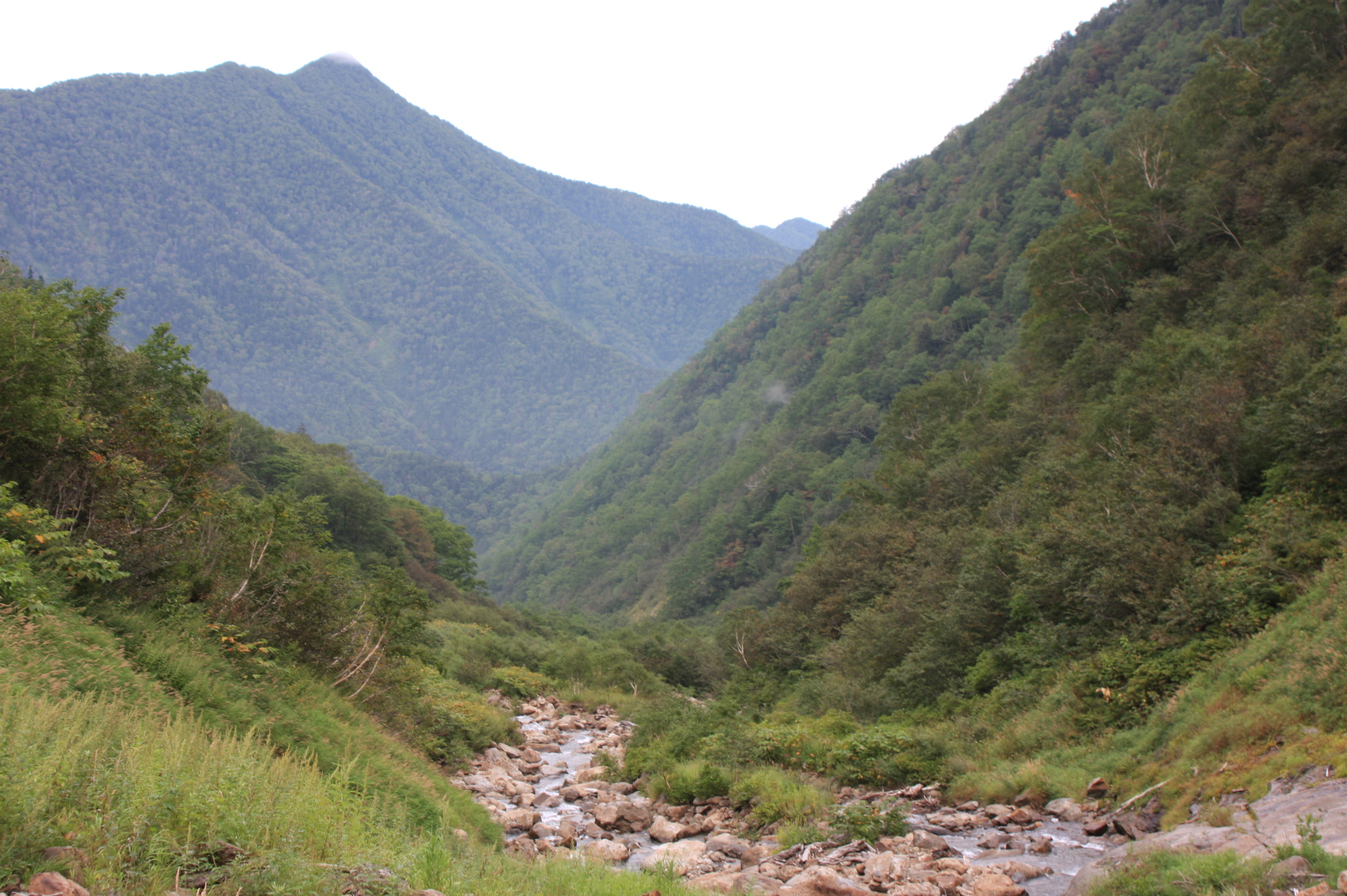 札内川八ノ沢 三股より